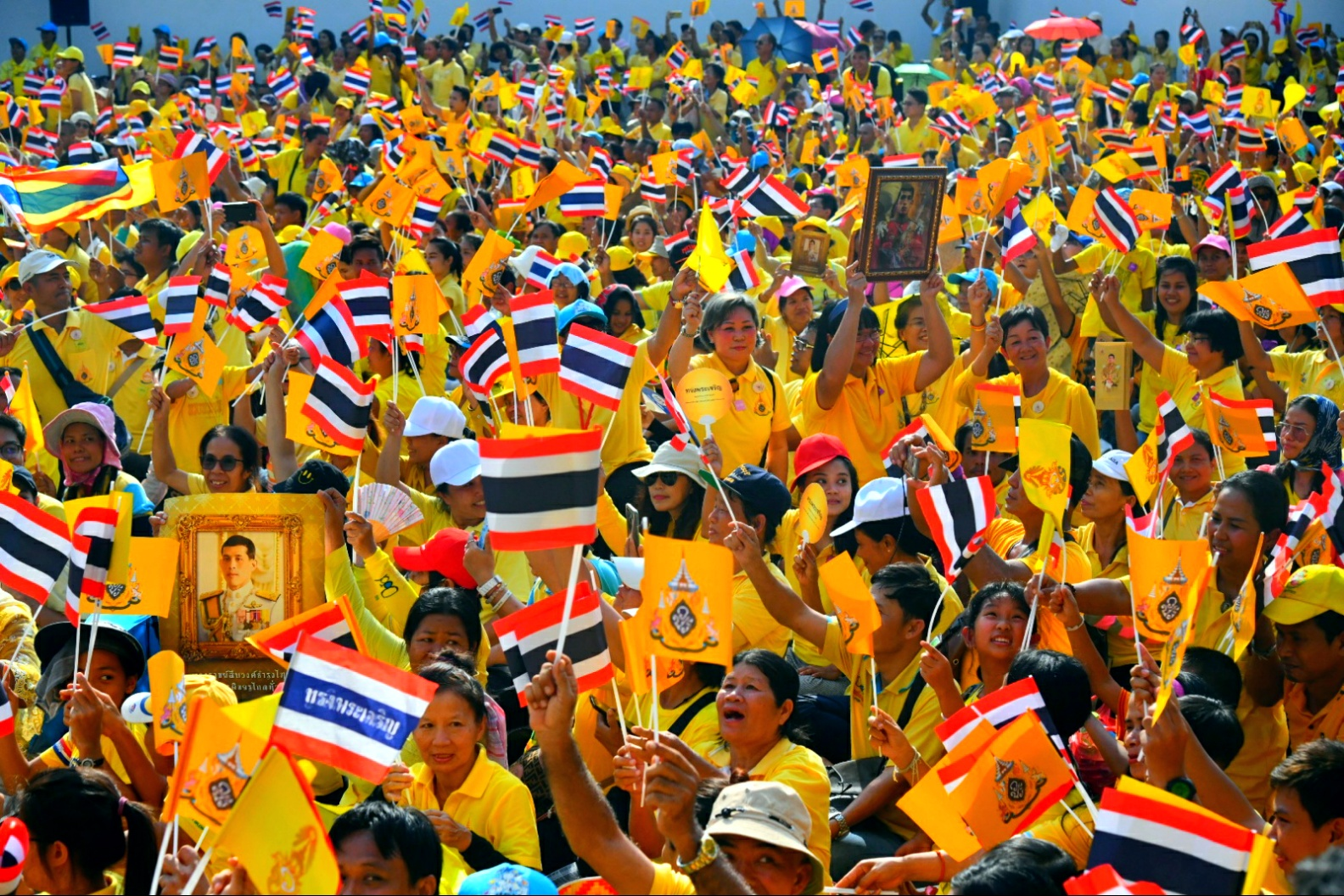 เจ้าหน้าที่ข้าราชการในพระราชพิธีบรมราชาภิเษก พุทธศักราช 2562